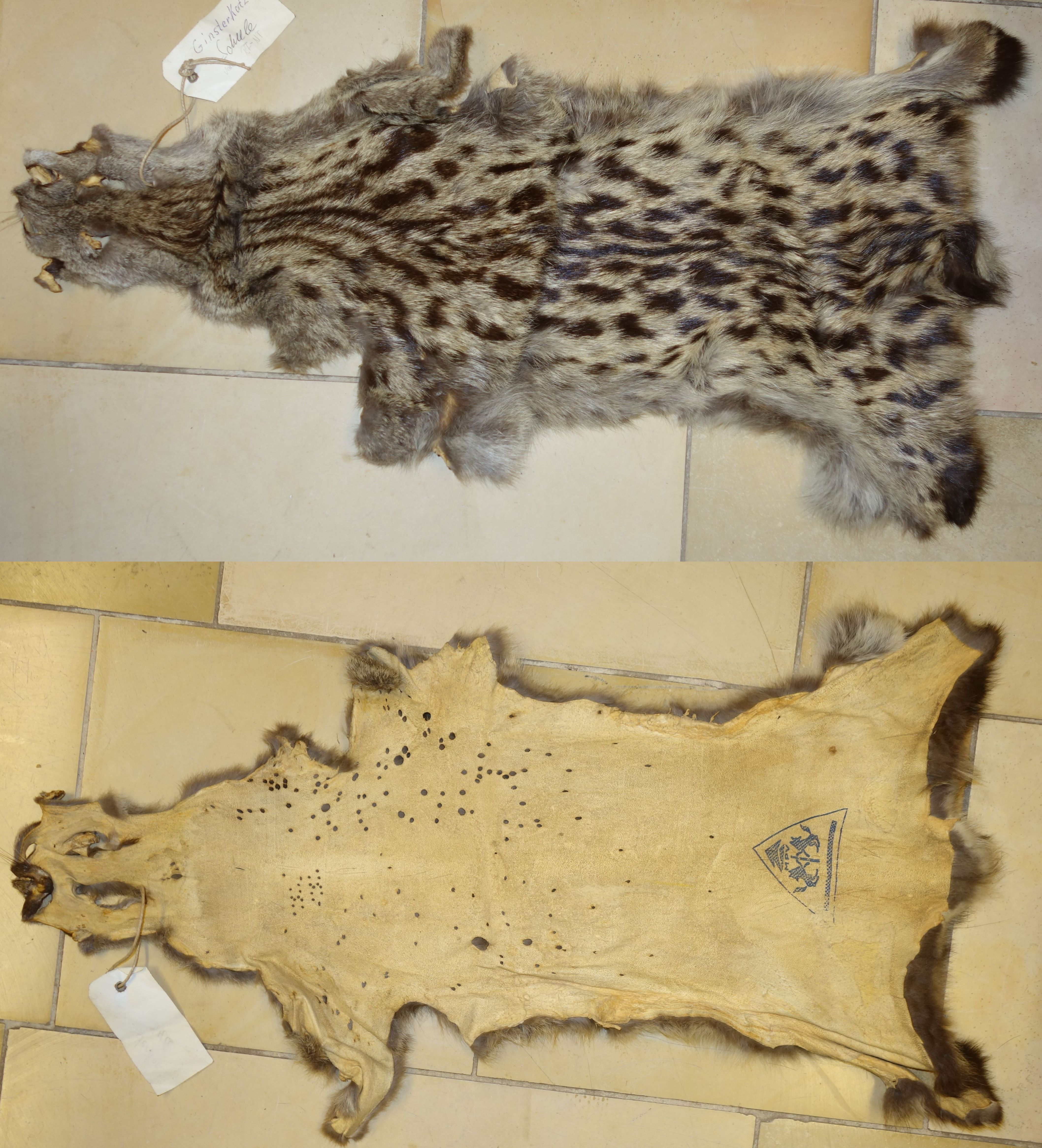 Ginsterkatzenfell, Lederseite. Zurichterstempel der Murrhardter Pelzveredlung MPV.